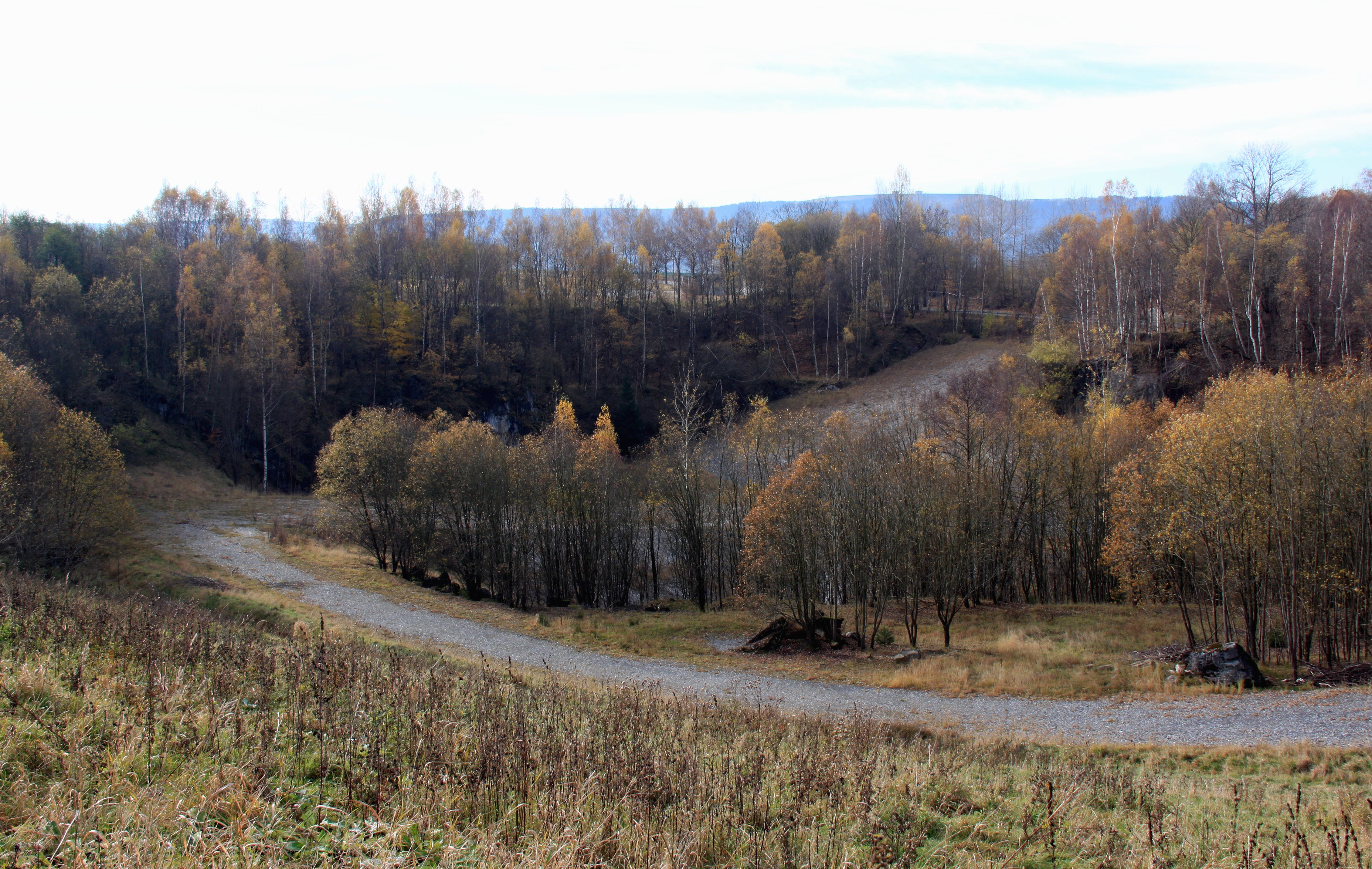 Ehemaliger Kalkbruch in Oberscheibe